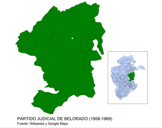 Este era el antiguo Partido Judicial de Belorado, que daba servicio a unas 10.061 almas. En los tiempos que nos ha tocado vivir solamente quedamos en el territorio de esta antigua jurisdicción territorial 6198 habitantes. Consta de 33 municipios: Alcocero de mola, Arraya de Oca, Bascuñana, Belorado, (Castil de Carrias, Eterna, Puras de Villafranca y Quintana-Loranco) Castildelgado, Cerezo de Río Tirón, (Quintanilla de las Dueñas) Cerratón de Juarros, Valle de Oca, (Cueva Cardiel, Villalbos, Villalomez y Villanasur de Río Oca) Espinosa del Camino, Fresneda de la Sierra Tirón, Fresneña, Fresno de Río Tirón, Pradoluengo, (Garganchón) Ibrillos, Villafranca, (Ocón de Villafranca) Pineda de la Sierra, Rábanos, Redecilla del Camino, San Vicente del Valle, Santa Cruz del Valle Urbión, Tosantos, Valmala, Viloria de Rioja, Villaescusa la Sombría, (Vilalescusa la Solana) Villafranca Montes de Oca, Villagalijo y Villambistia.